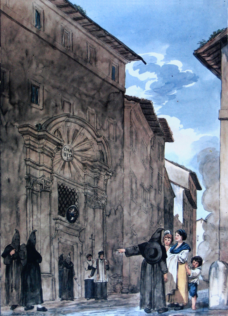 Chiesa distrutta di San Salvatore ad Tres Images